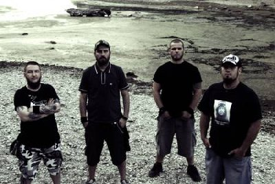 Heavyweight 3rd Round harmadik nagylemez felállása